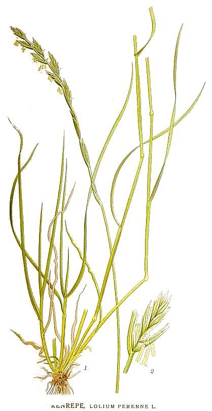 Lolium perenne L. Original Description "Renrepe", Lolium perenne L.